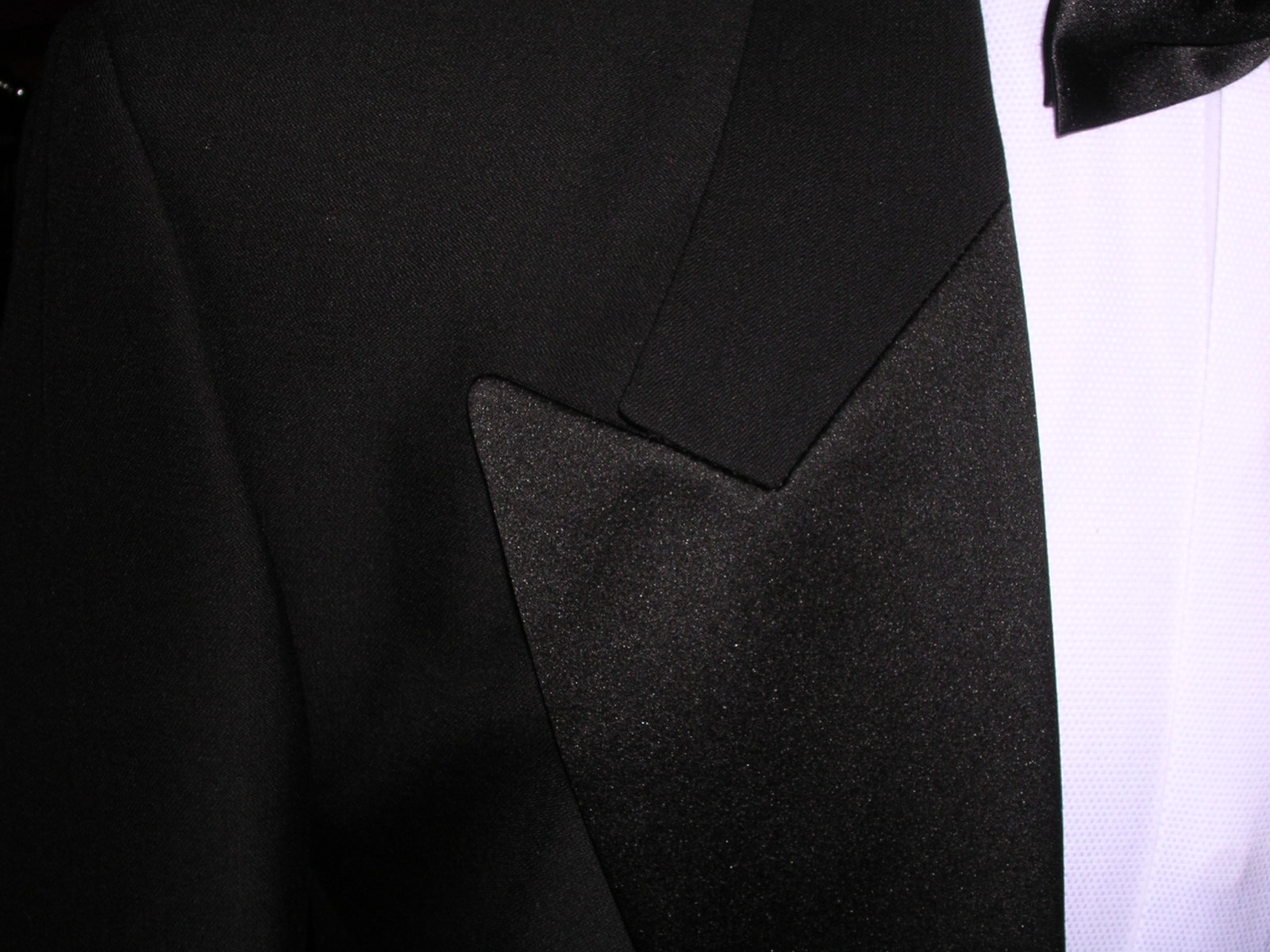 Solapa de un esmoquin